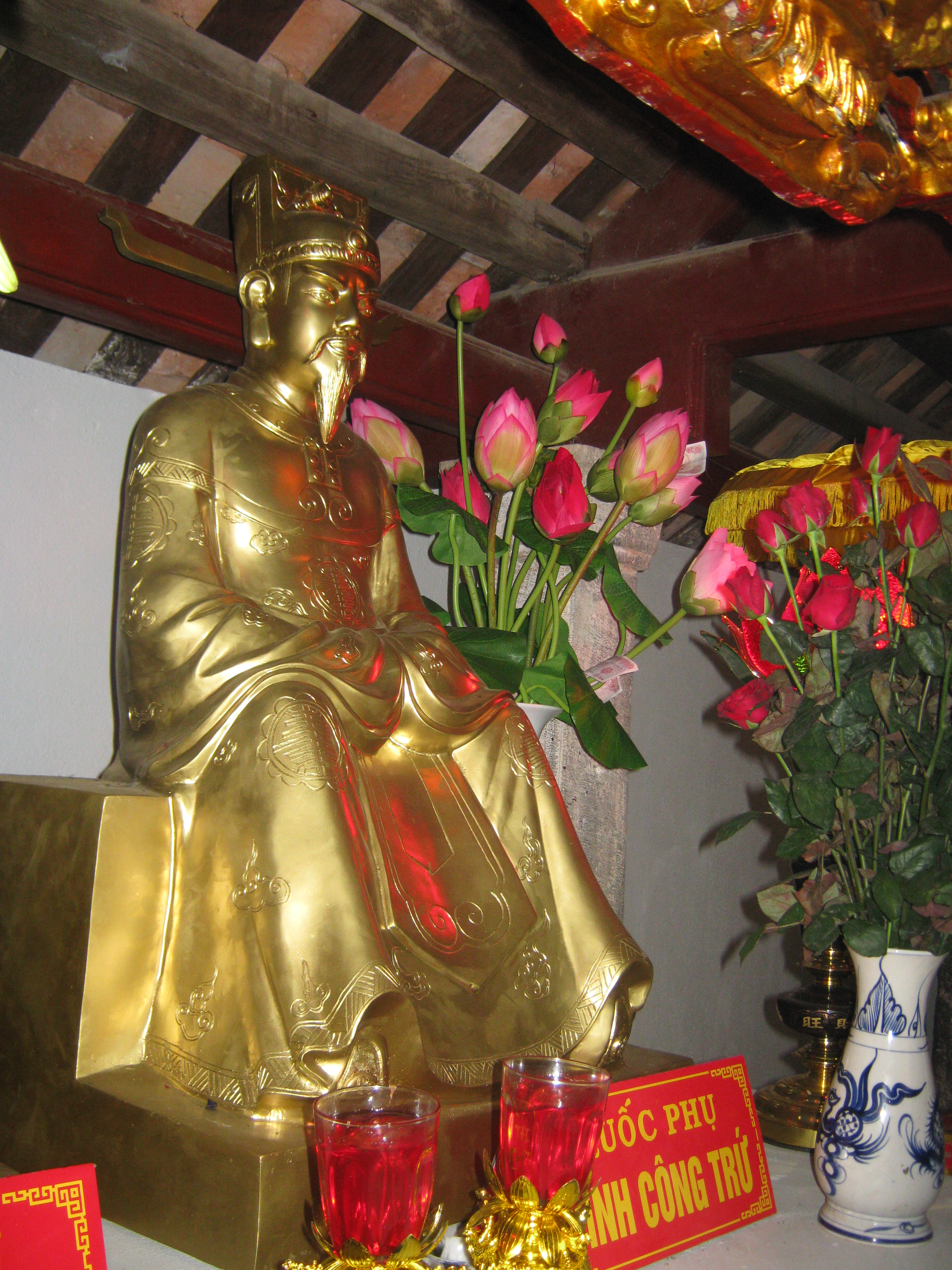 Tượng Đinh Công Trứ tại đền Vua Đinh Tiên Hoàng ở cố đô Hoa Lư